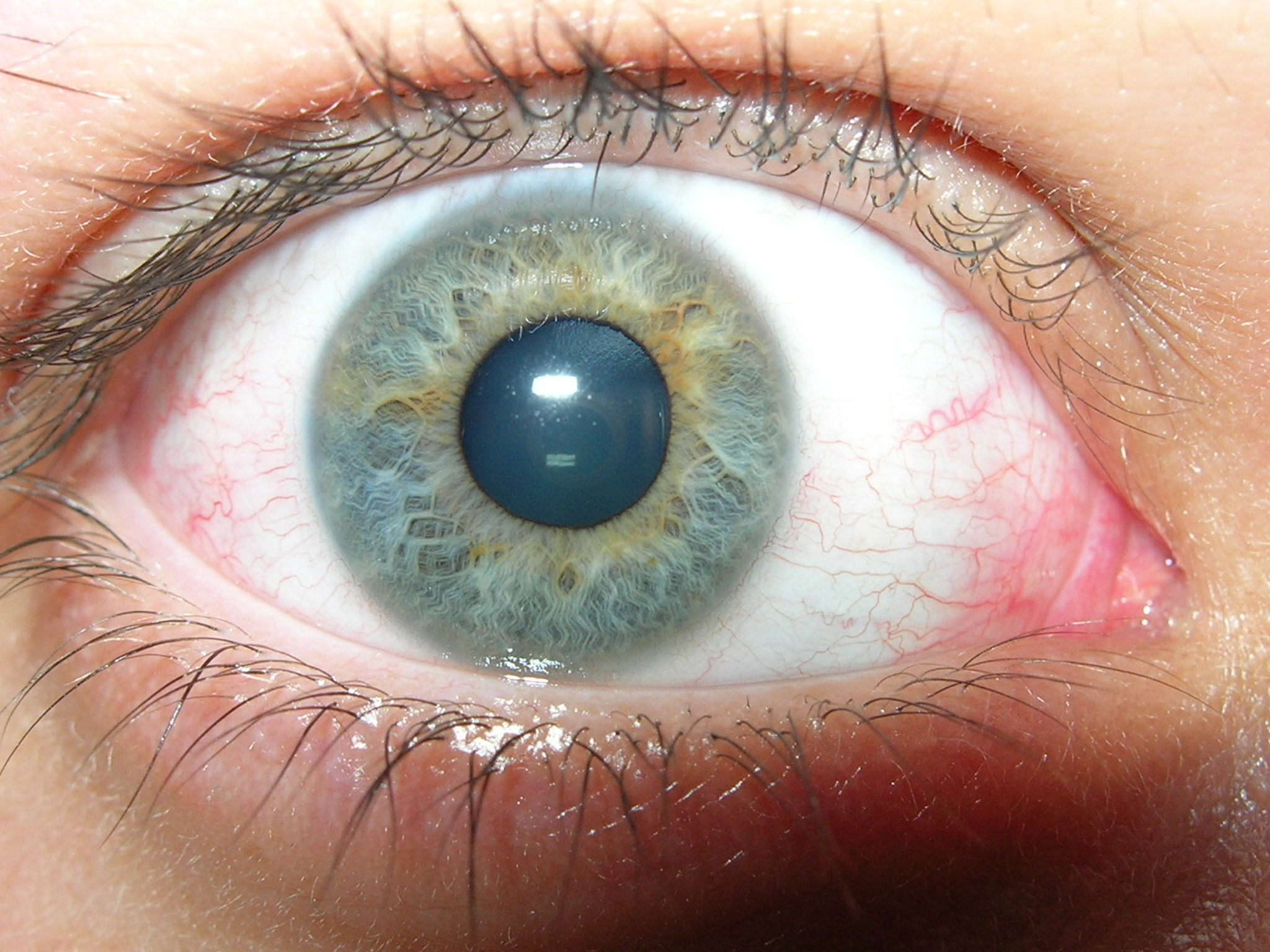 ma photo perso pour la page perso